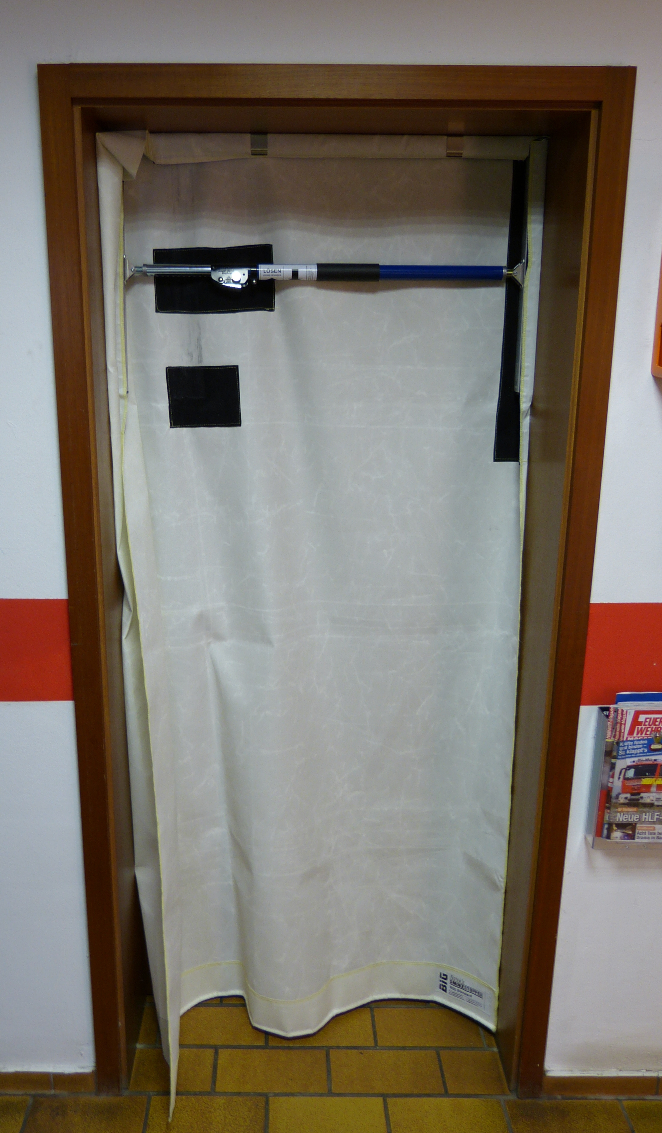 Der mobile Rauchverschluss wird von der Feuerwehr im Türrahmen des Brandraumes eingespannt bevor die Tür geöffnet wird. Dadurch wird Brandrauch weitestgehend am Austritt aus der Tür gehindert. Aufgrund der Flexibilität des Stoffs können Schläuche am Boden verlegt werden und Einsatzkräfte können den Raum betreten bzw. verlassen.